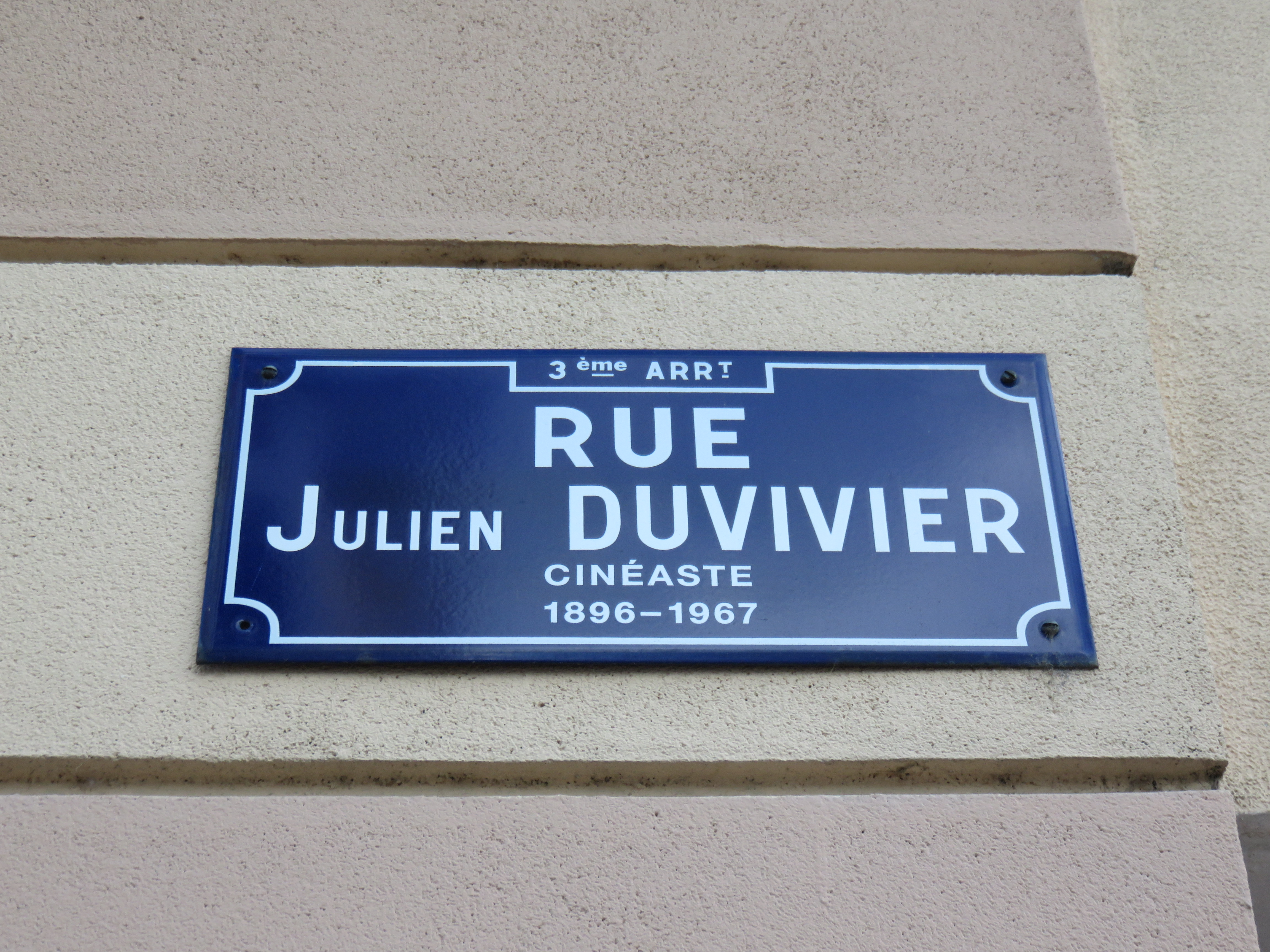 Plaque de la rue Julien Duvivier, dans le 3e arrondissement de Lyon.